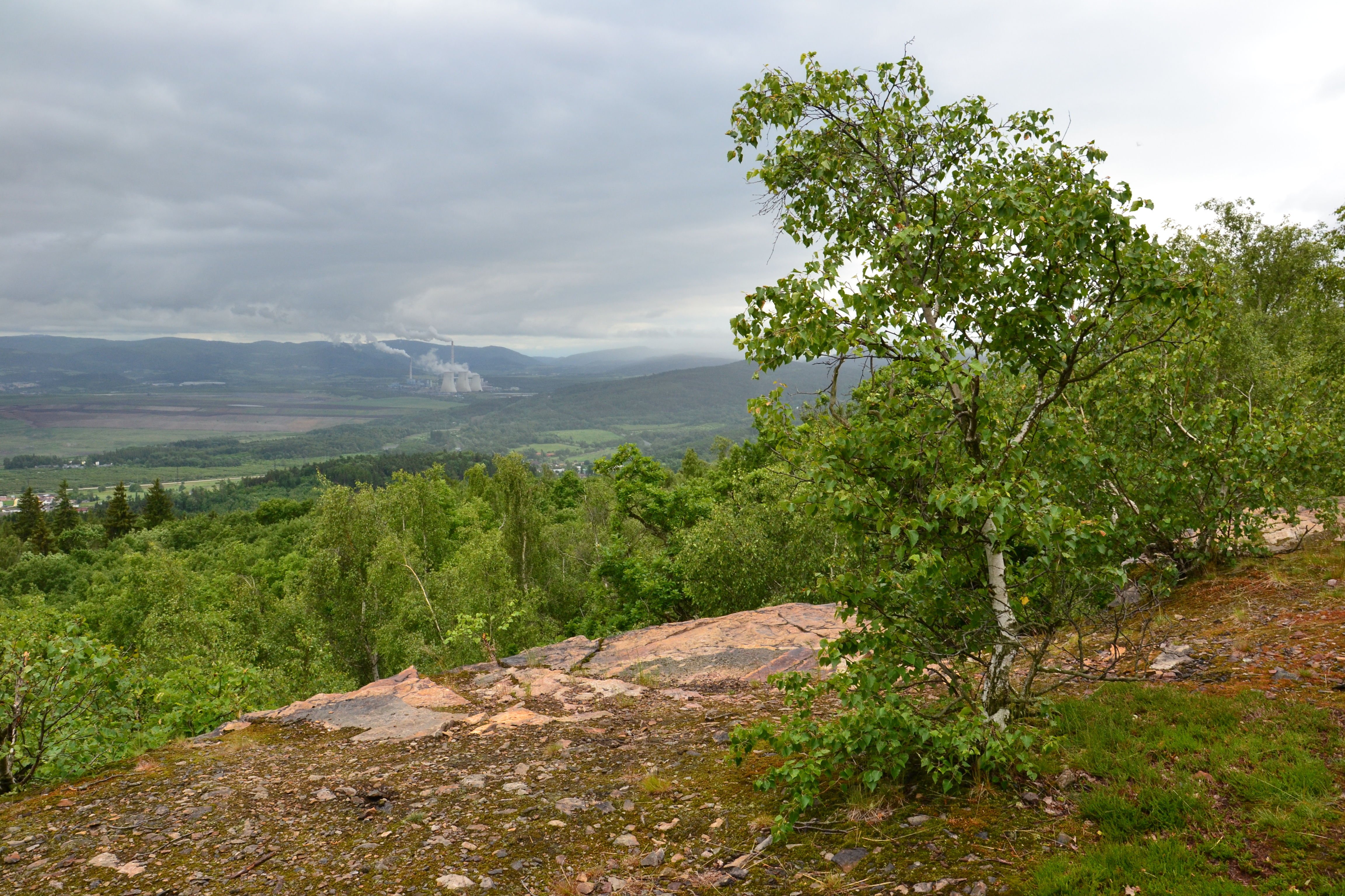 Hradiště u Černovic – okraj lomové stěny na jižní straně vrchu s výhledem na prunéřovskou elektrárnu